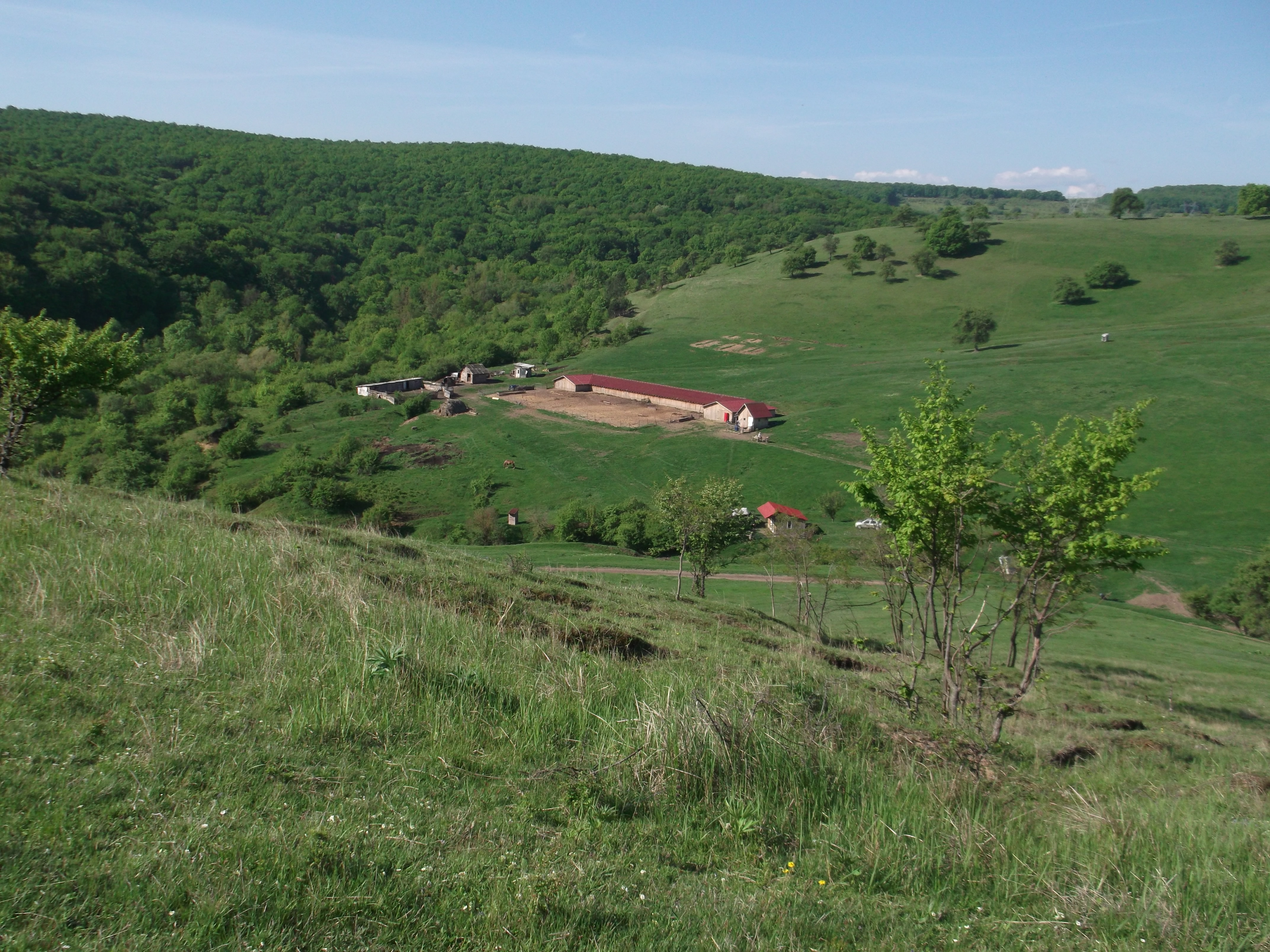 Baciu, judetul Cluj, zona de sud-vest, la granita cu satul Suceagu.